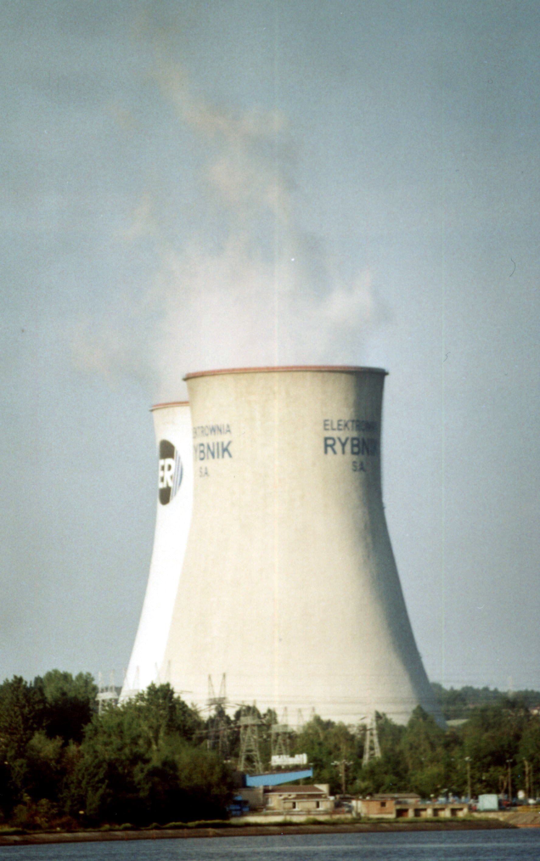 Věže rybnické tepelné elektrárny